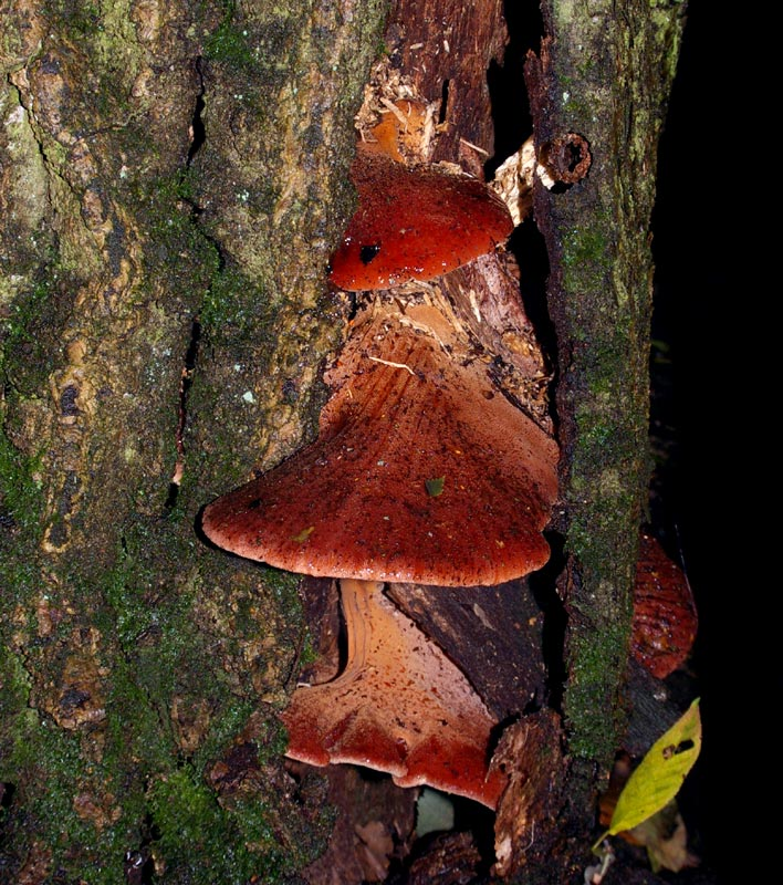 Fistulina hepatica